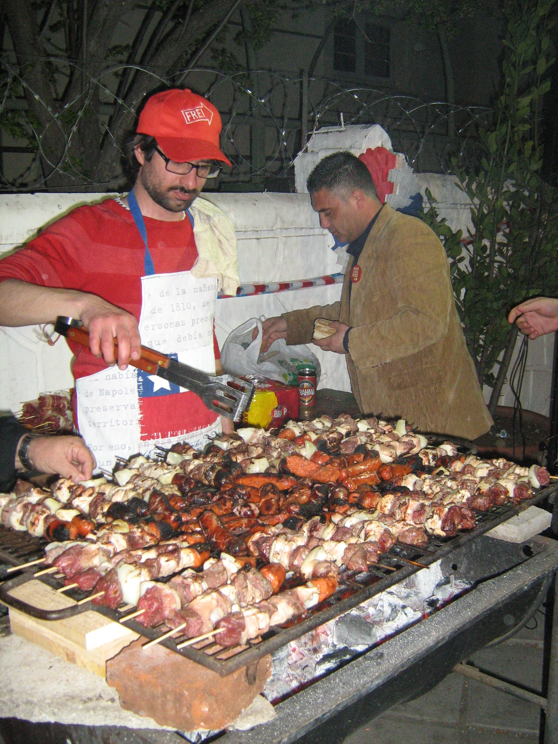 Celebración de Fiestas Patrias del equipo de campaña de Eduardo Frei junto a una parrilada y baile.